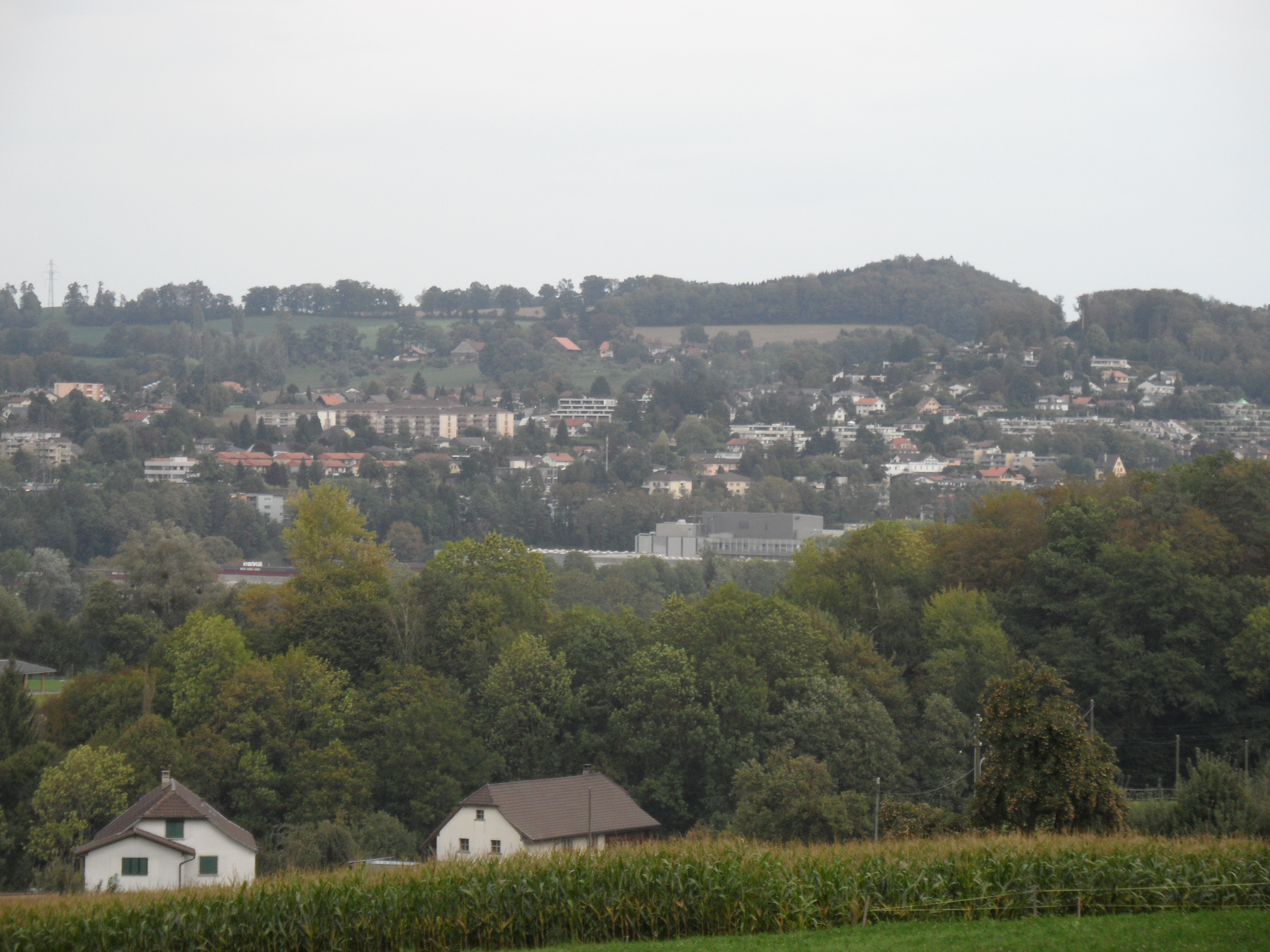 Vue de Marly dans le canton de Fribourg en Suisse depuis le hameau de Chésalles.